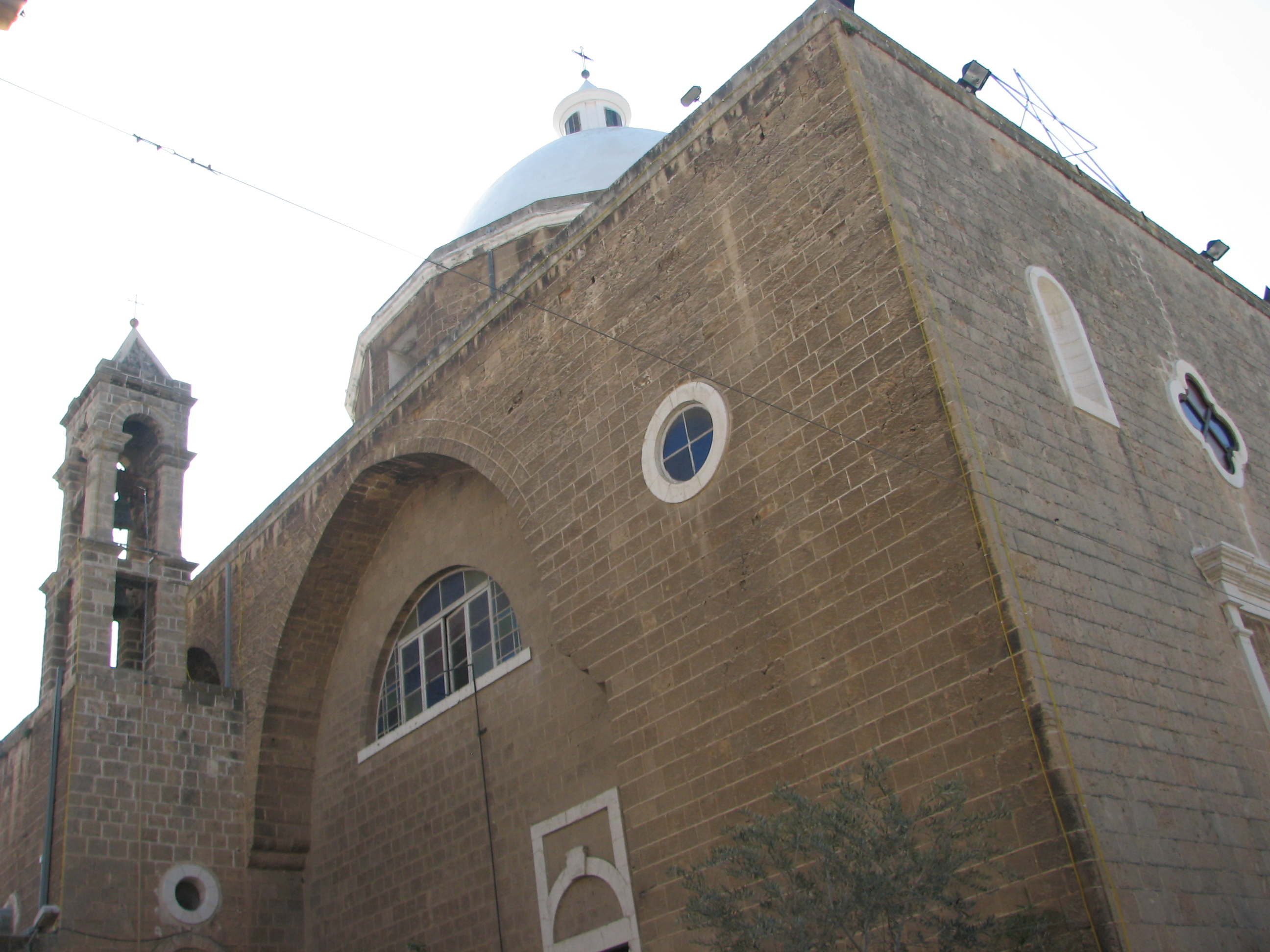 PChurch – Paroisse Maronite St. Louis, Haifa הכנסייה המרונית בעיר התחתית בחיפה ליד כיכיר פריס